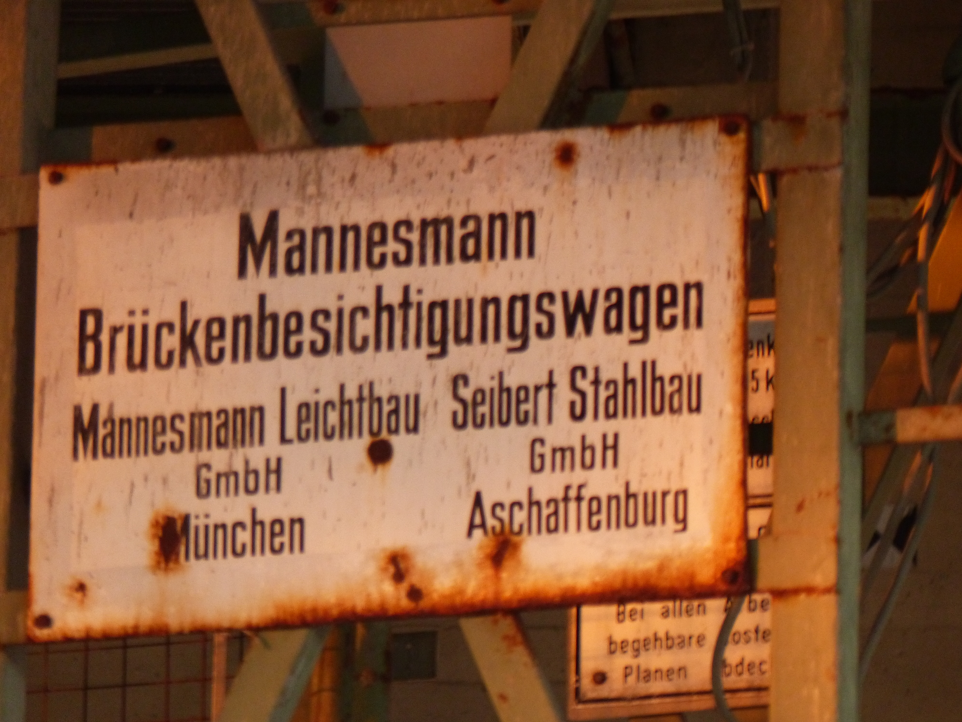 Das Typenschild eines in der Nähe des Dorfes Pühlheim gelegenen Brückenbesichtigungswagen)